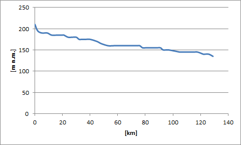 Výškový profil tratí 090 Praha–Vraňany–Děčín. Doplněk k předchozímu grafu od jiného autora.